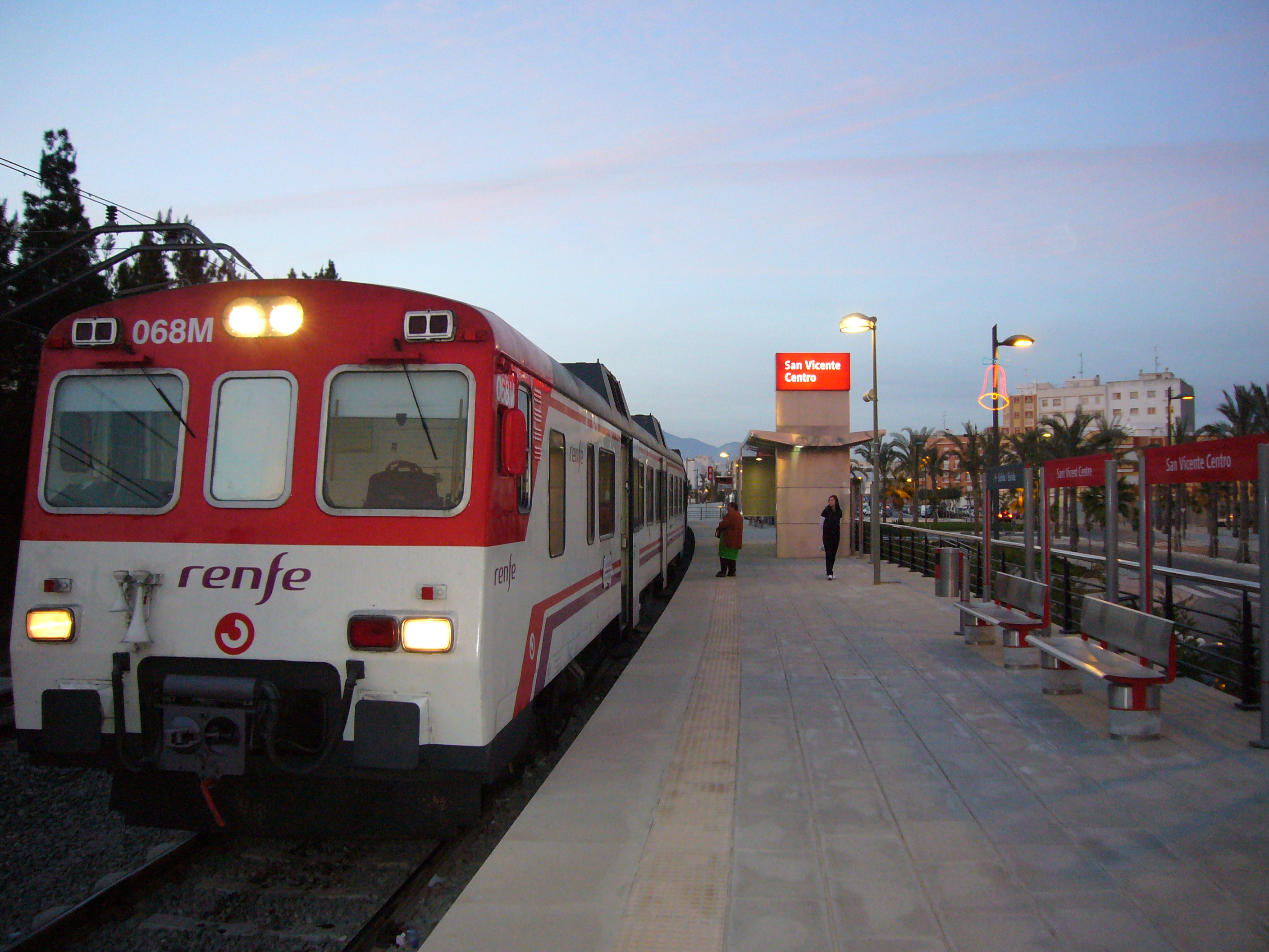 Camello 592-068M de RENFE, en San Vicente del Raspeig